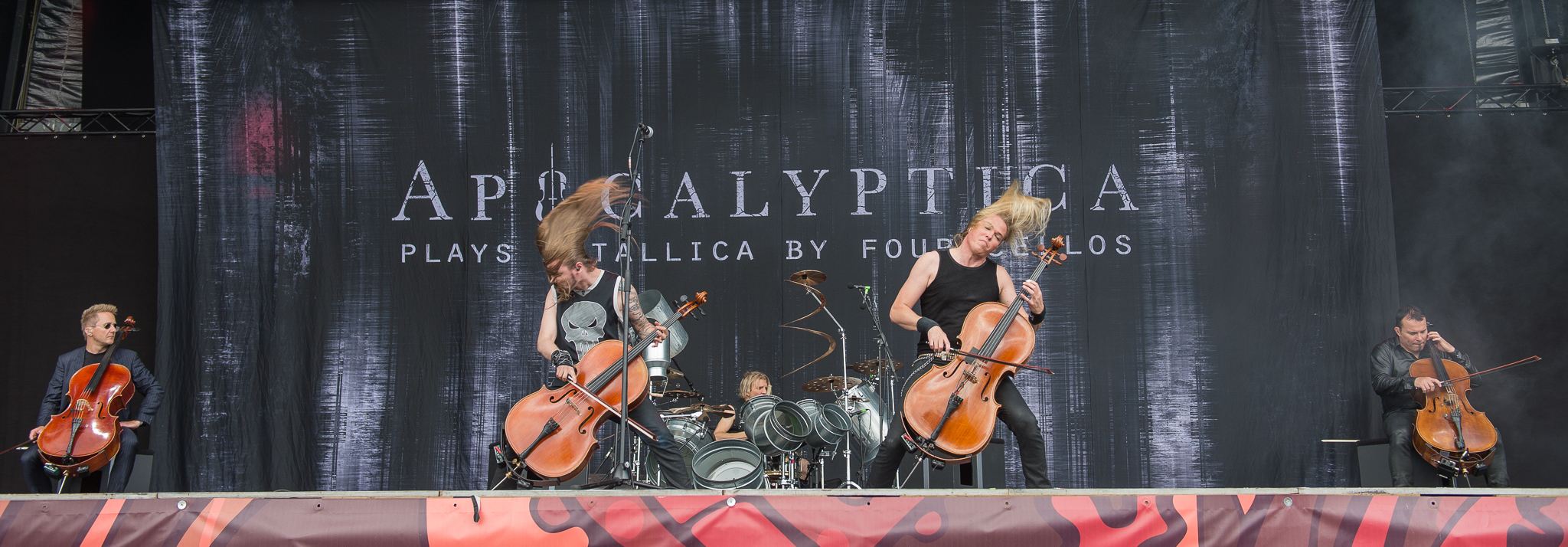 Antero Manninen,Apocalyptica,Deichbrand,ESK Events & Promotion GmbH,Eicca Toppinen,Festival,Fire Stage,Konzert,Livekonzert,Livemusik,Mikko Sirén,Paavo Lötjönen,Perttu Kivilaakso,Sea-Airport Cuxhaven/Nordholz,See-Flughafen Cuxhaven/Nordholz,Seeflughafen Cuxhaven/Nordholz